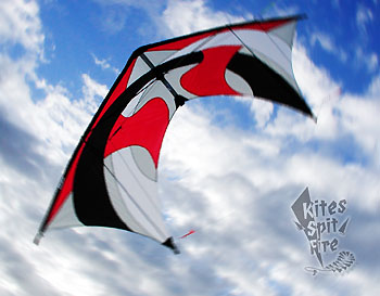 drachen vierleiner ballettdrachen "vision" kites spit fire KSF